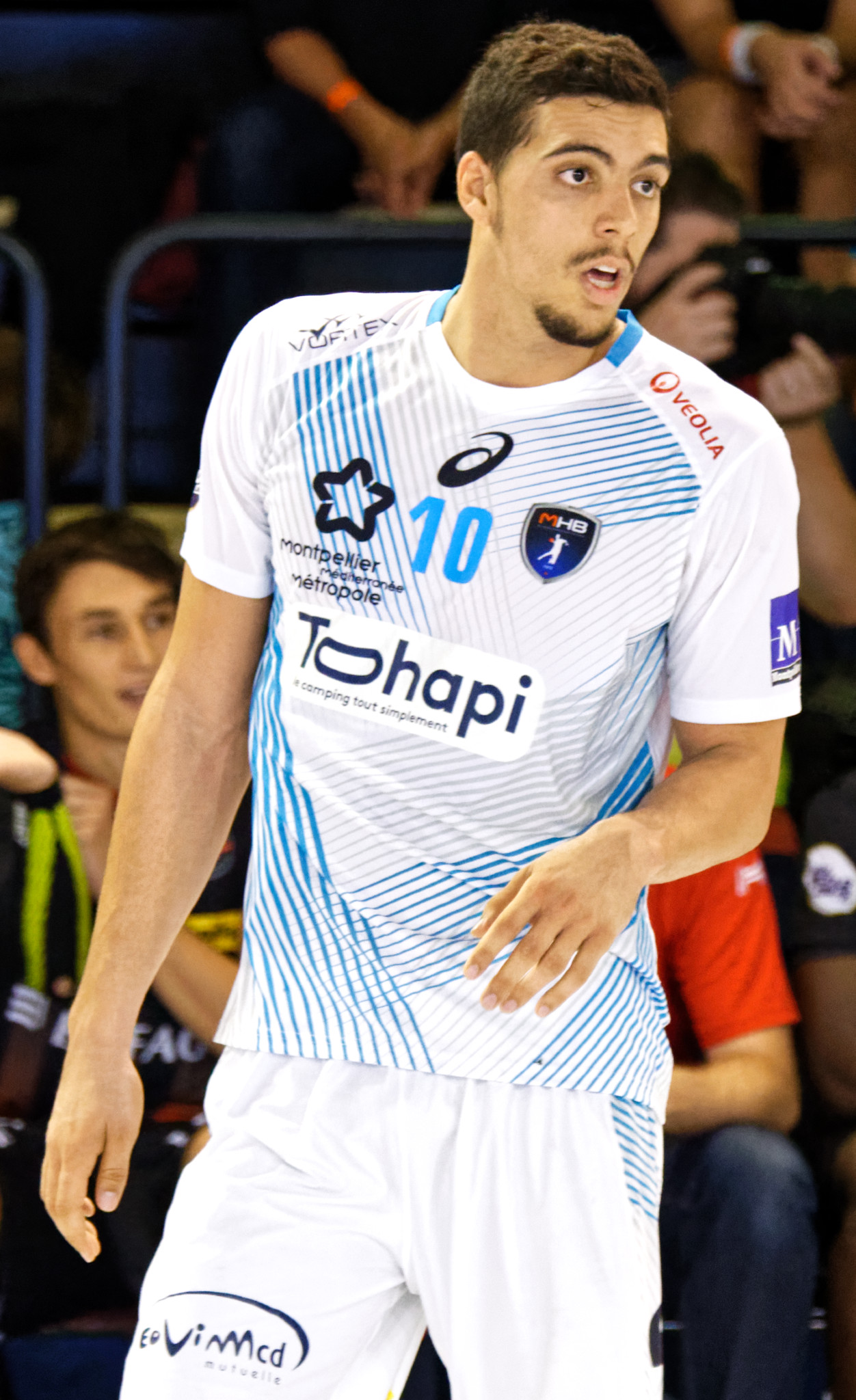 Rencontre de championnat entre l'US Ivry et Montpellier. A Ivry, le 28 septembre 2016.